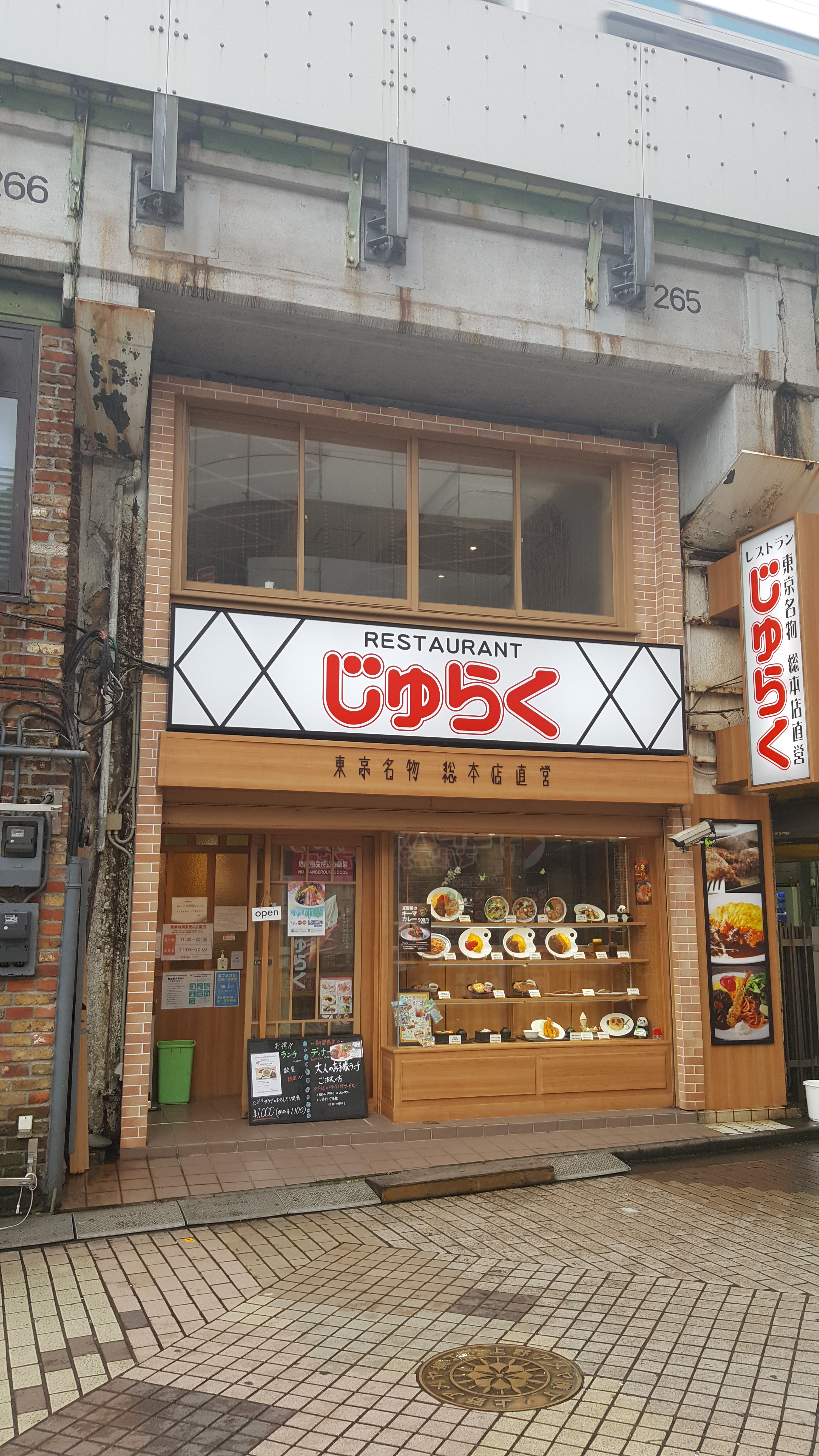 じゅらく上野総本店アメ横通り側から撮影